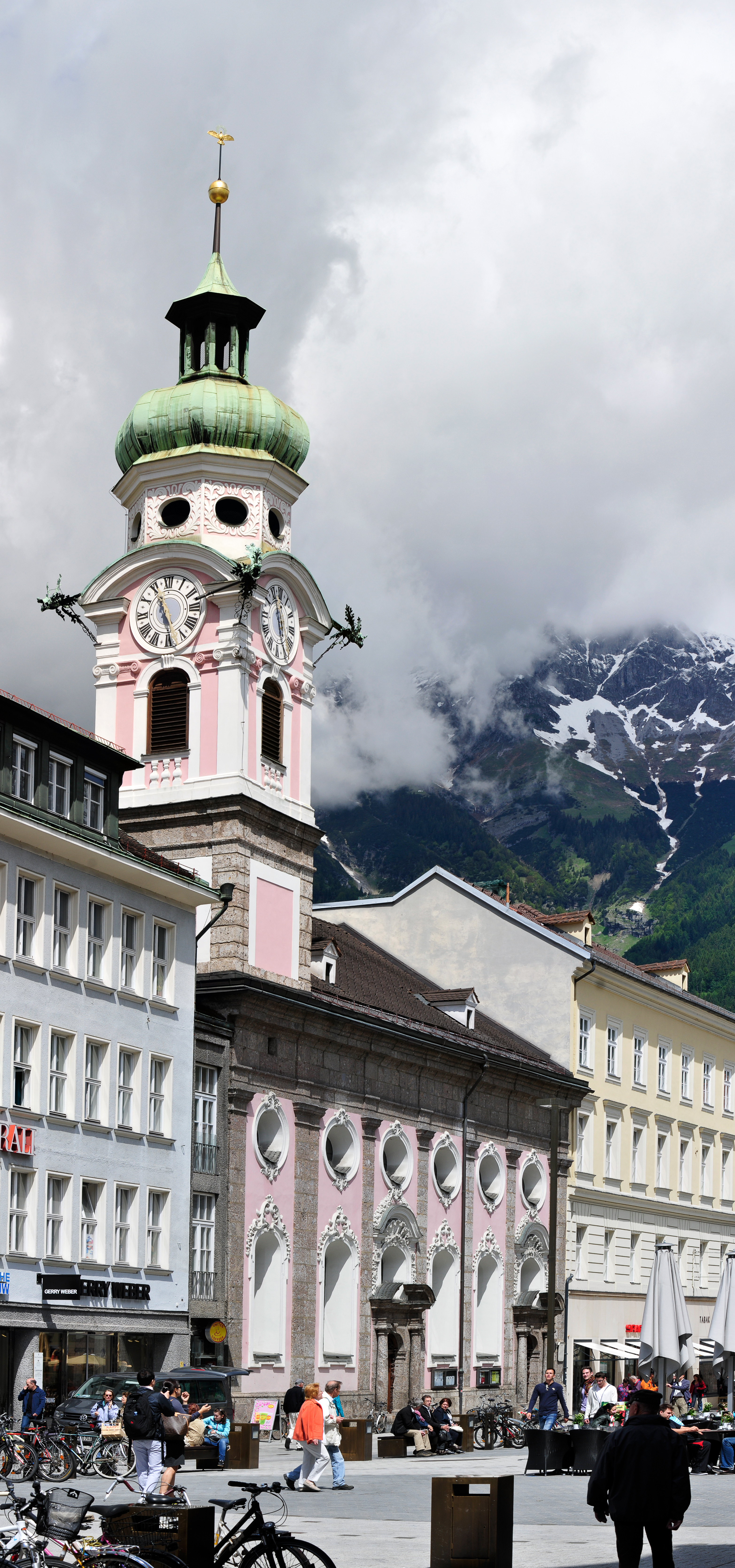 Spitalskirche (Innsbruck) Im Rahmen des Fußballländerspiels Österreich gegen Rumänien bin ich einige Stunden durch Innsbruck gefahren und habe Aufnahmen gemacht, die vielleicht mal gebraucht werden könnten. --Ralf Roleček 11:20, 10 June 2012 (UTC) The making of this work was supported by Wikimedia Austria. For other files made with the support of Wikimedia Austria, please see the category Supported by Wikimedia Österreich.